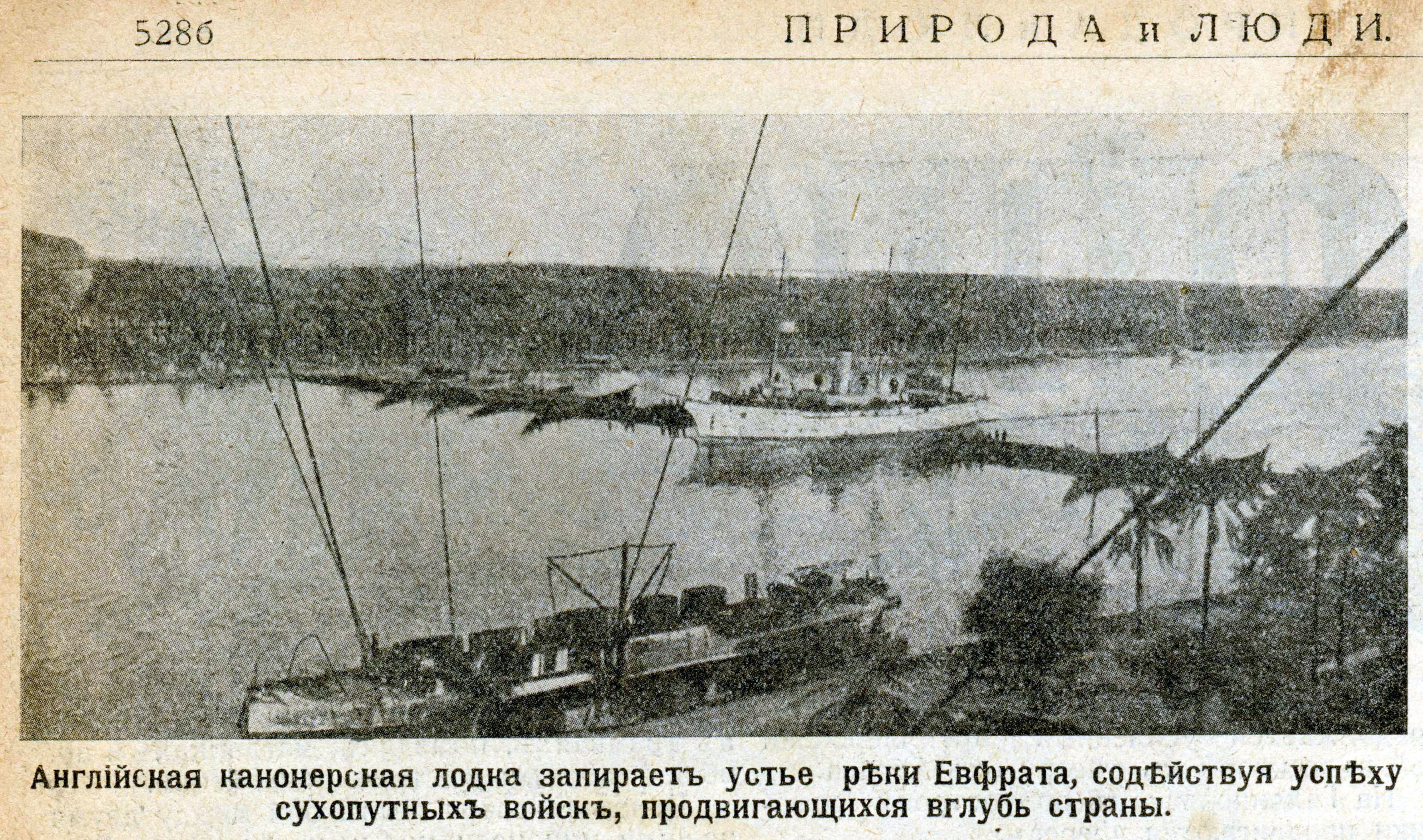 Английская канонерская лодка запирает устье реки Евфрата [в буквальном смысле], содействуя успеху [британских] сухопутных войск, продвигающихся вглубь страны [Османской Империи]. (подпись под снимком).